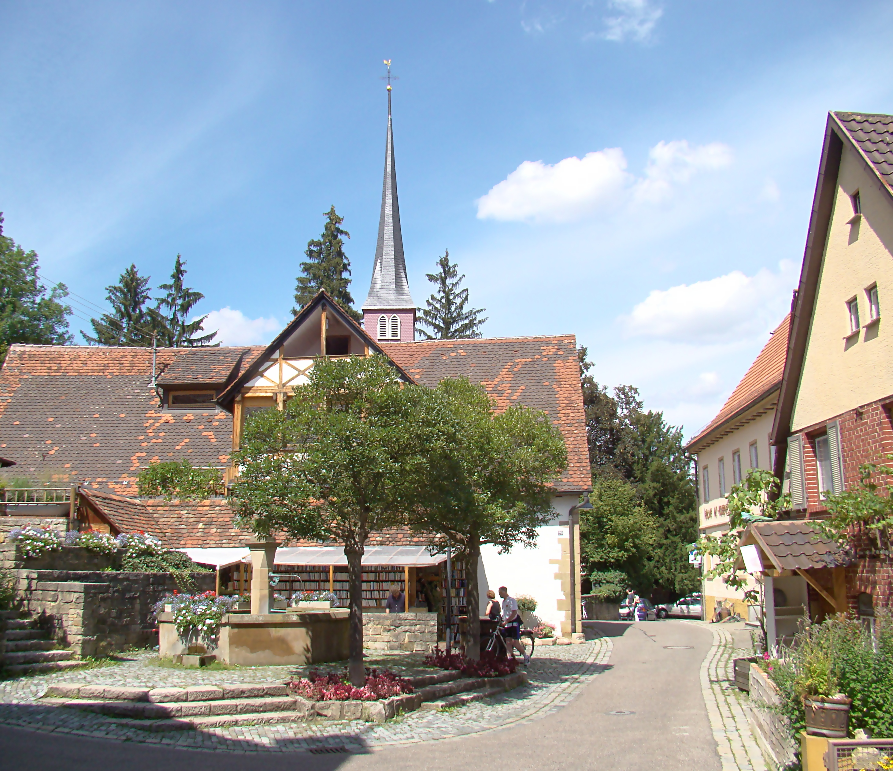 Ludwigsburg-Hoheneck, alter Ortskern Ludwigsburg-Hoheneck, old village centre